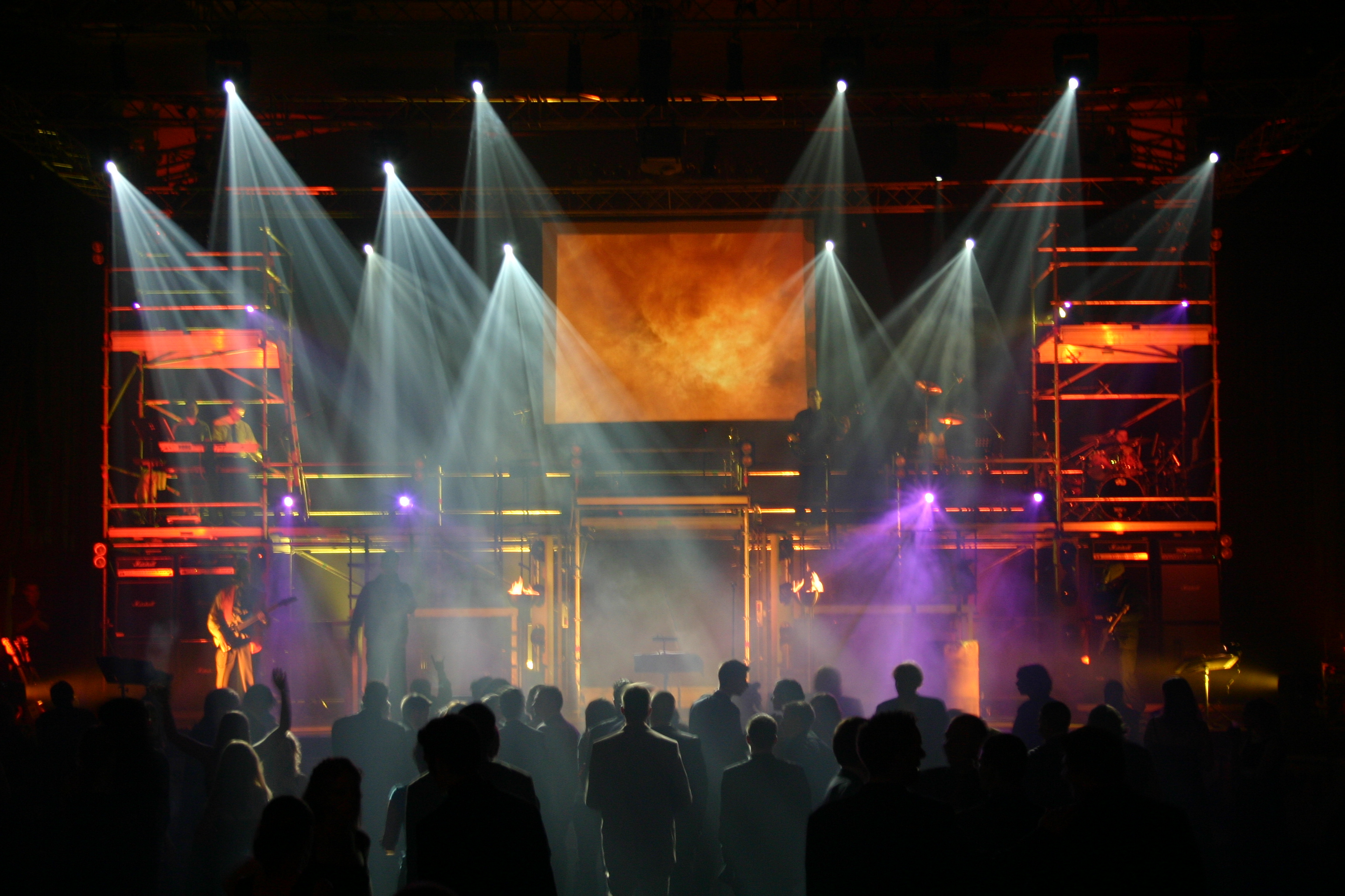 D'Providers um Lécker Bal 2005.